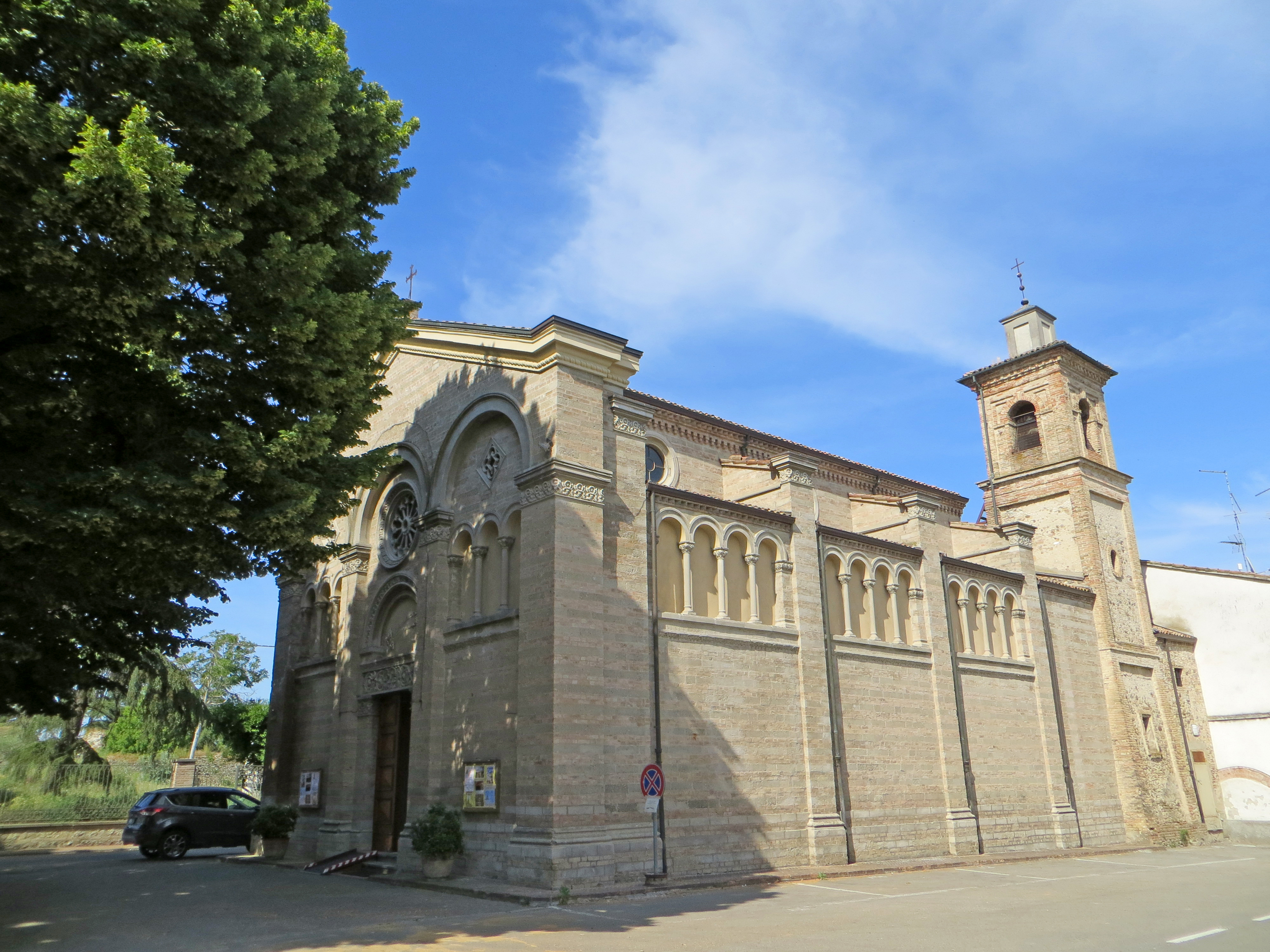 Chiesa di San Quintino (Montechiarugolo) - facciata e lato sud